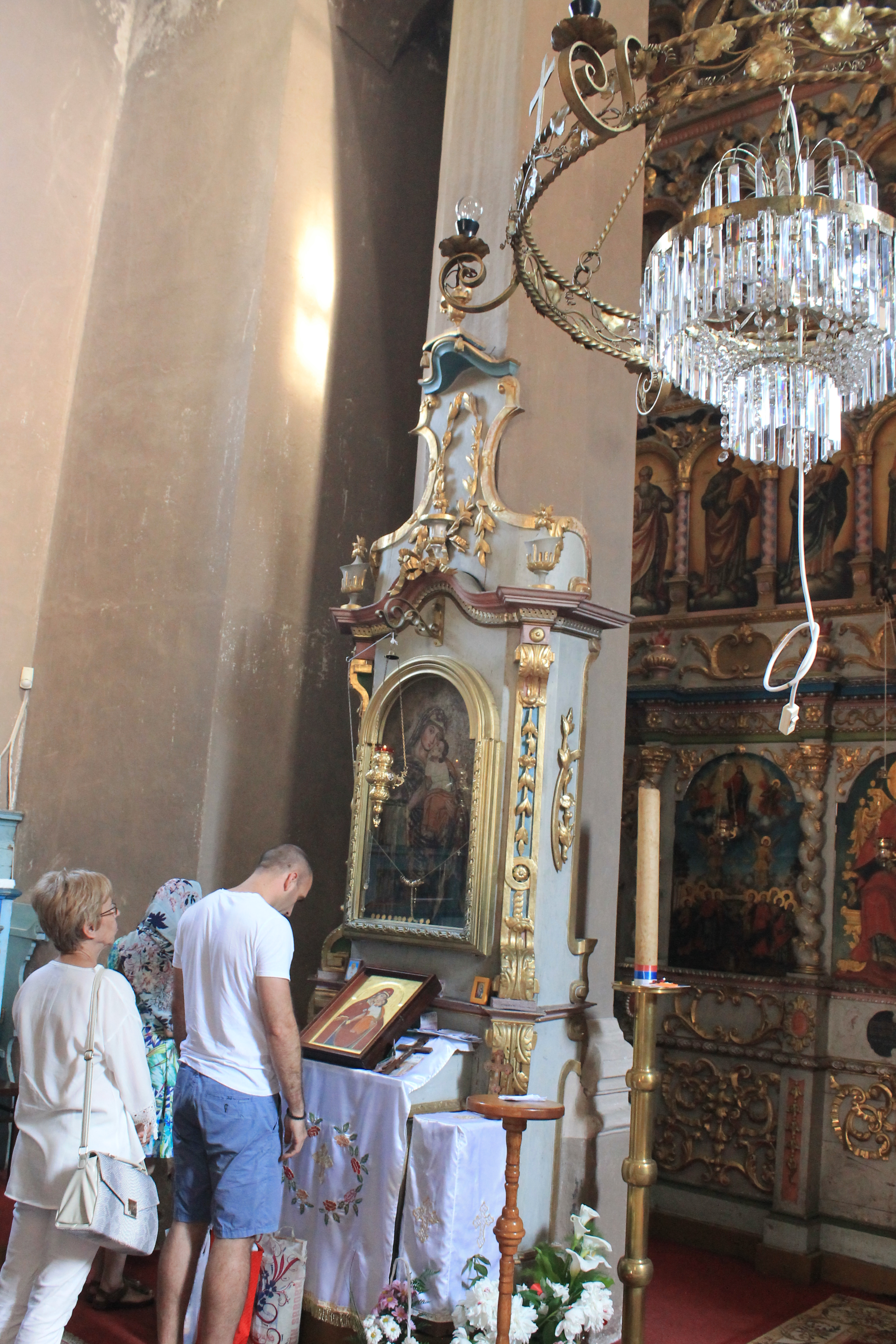 Manastir Beočin